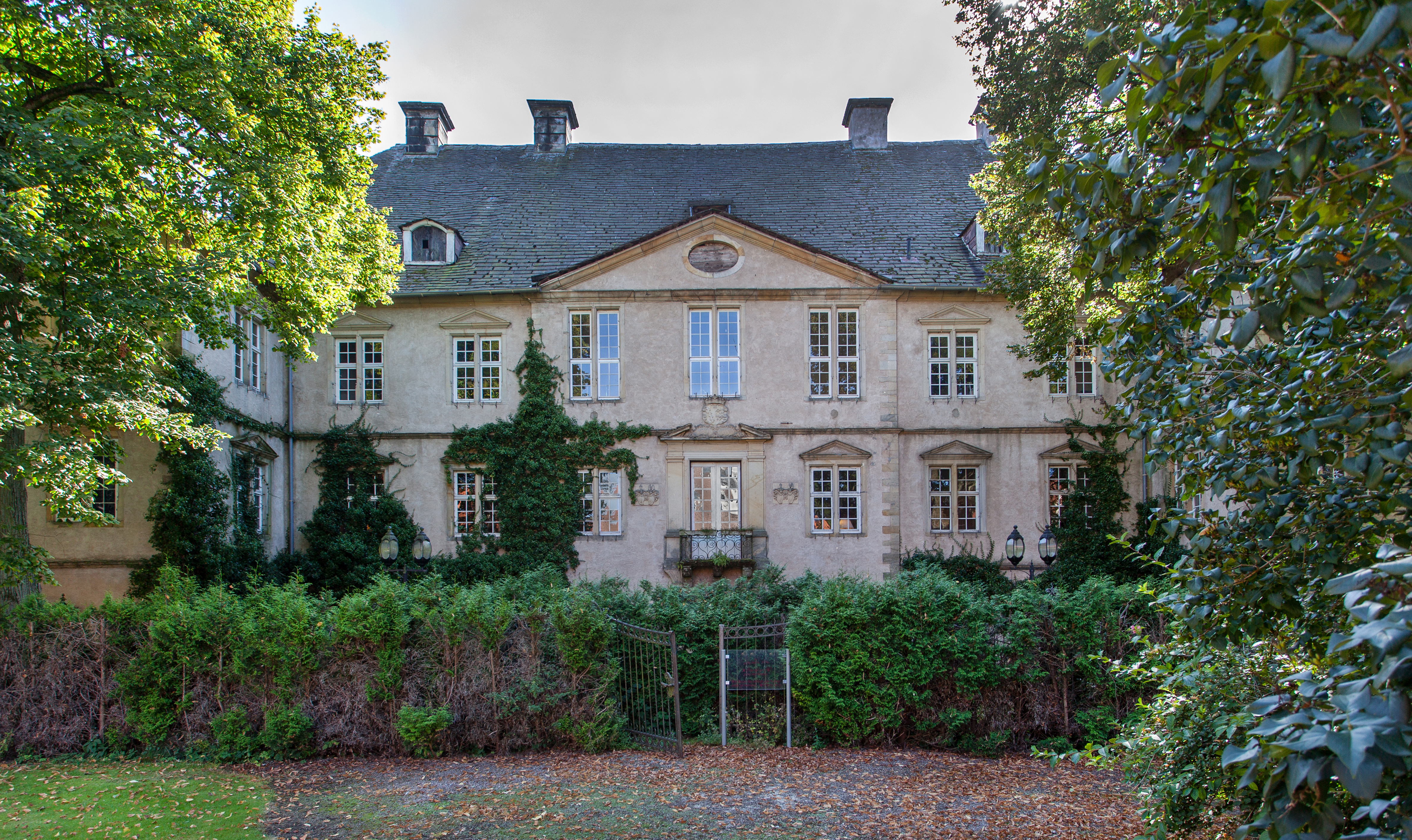 Schloss Wöbbel (Schieder-Schwalenberg), Nordseite This is the photograph of an architectural monument. It is part of the list of cultural monuments of Schieder-Schwalenberg, no. 2